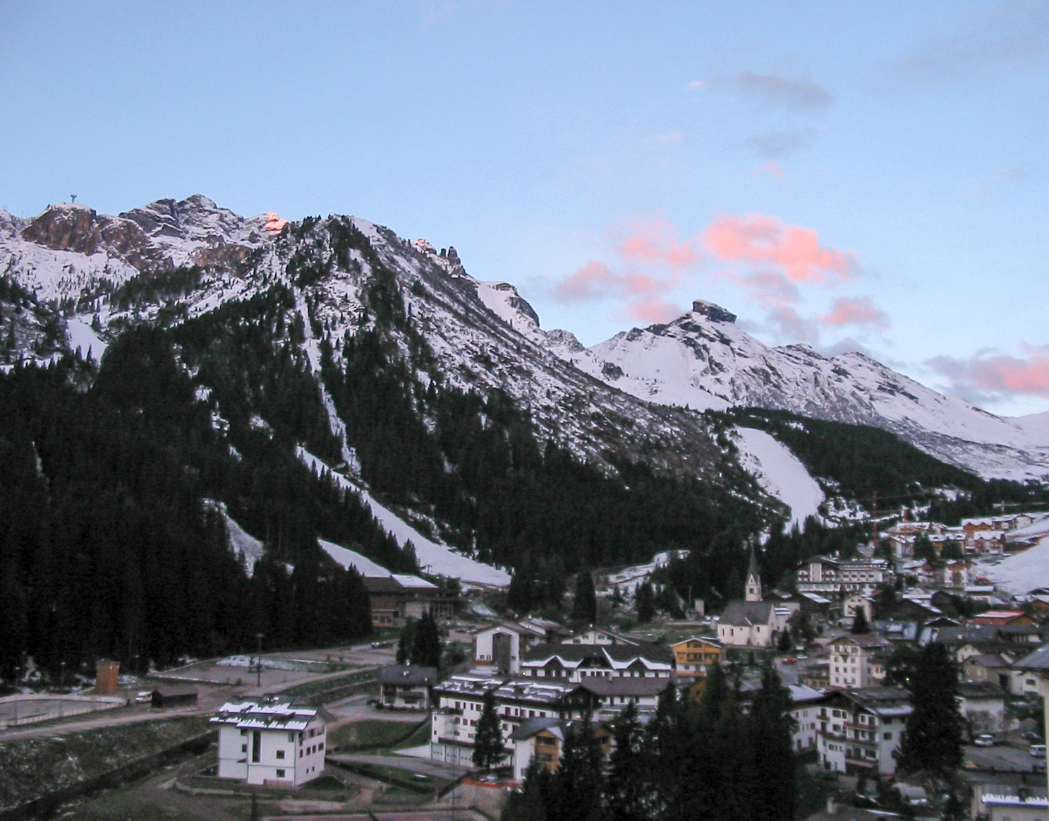 Arabba in der herbstlichen Morgendämmerung, vom Anstieg zum Campolungo-Paß aus aufgenommen. Im Hintergrund der Padonkamm (nördlicher Vorkamm des Marmolata-Massivs) zwischen Porta Vescovo und Pordoi-Pass